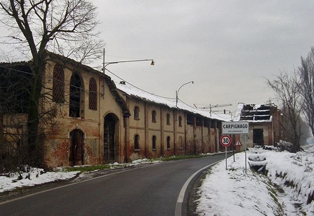 Carpignago